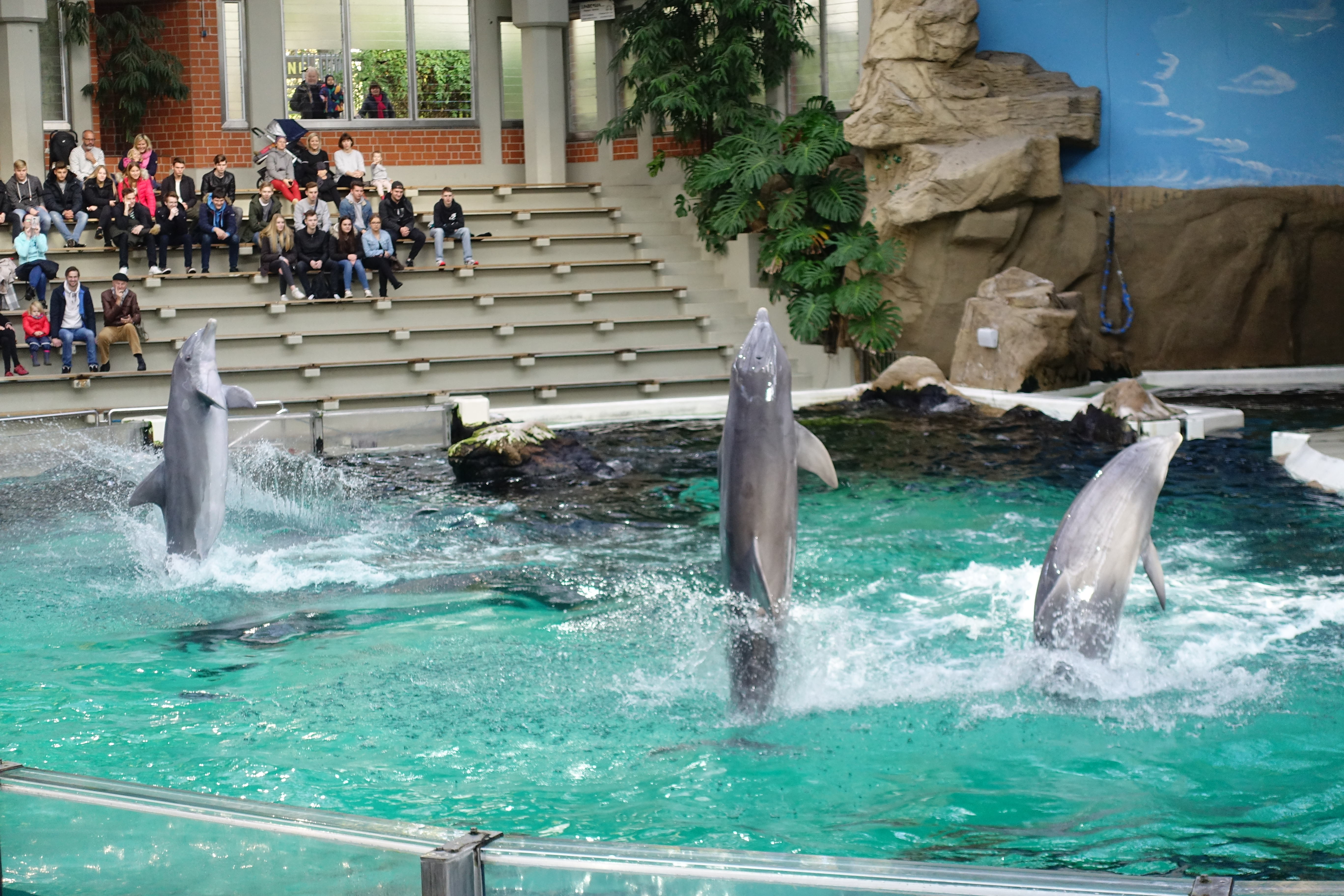 Eine Show im Delfinarium des Zoos Duisburg. Die Tiere sind Große Tümmler. Der Eintritt für die Show ist im Zoo-Eintritt enthalten.